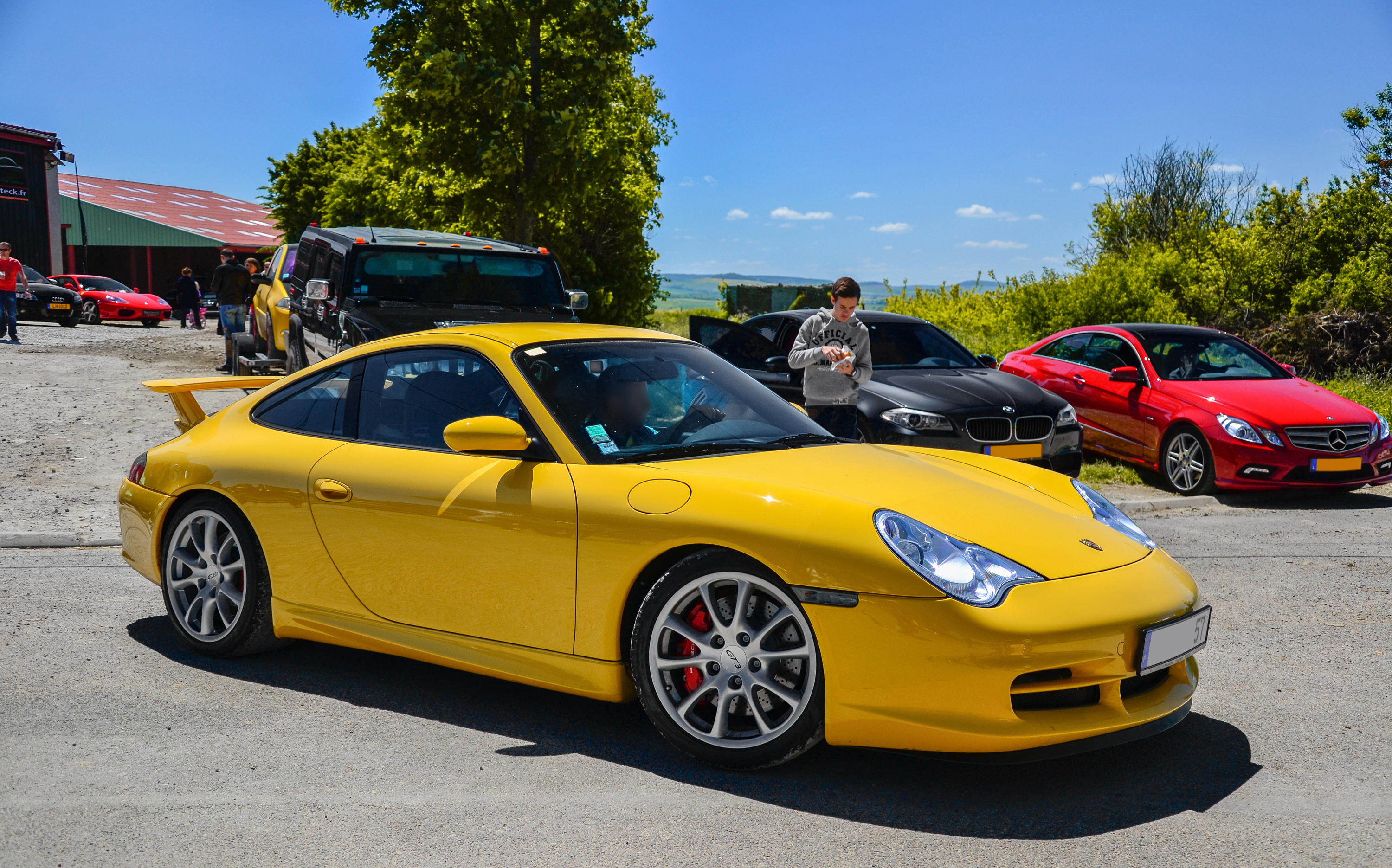 Porsche 996